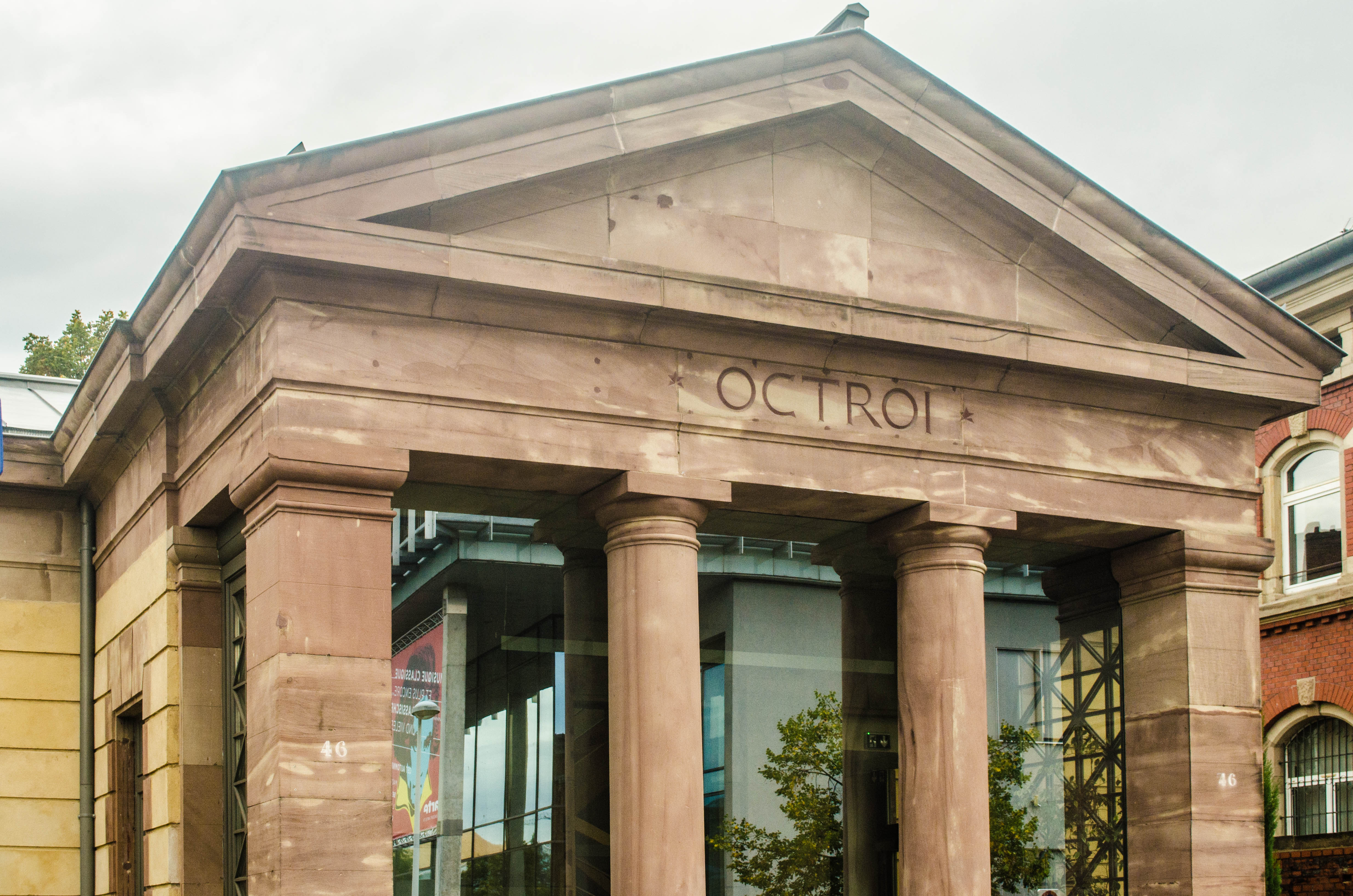 Ancien pavillon d’octroi à Strasbourg